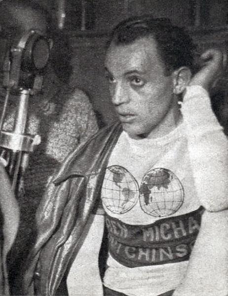 Le cycliste Georges Paillard en octobre 1937 (après son trajet Chartres-Paris en 1 heure et 8 minutes, derrière une moto).